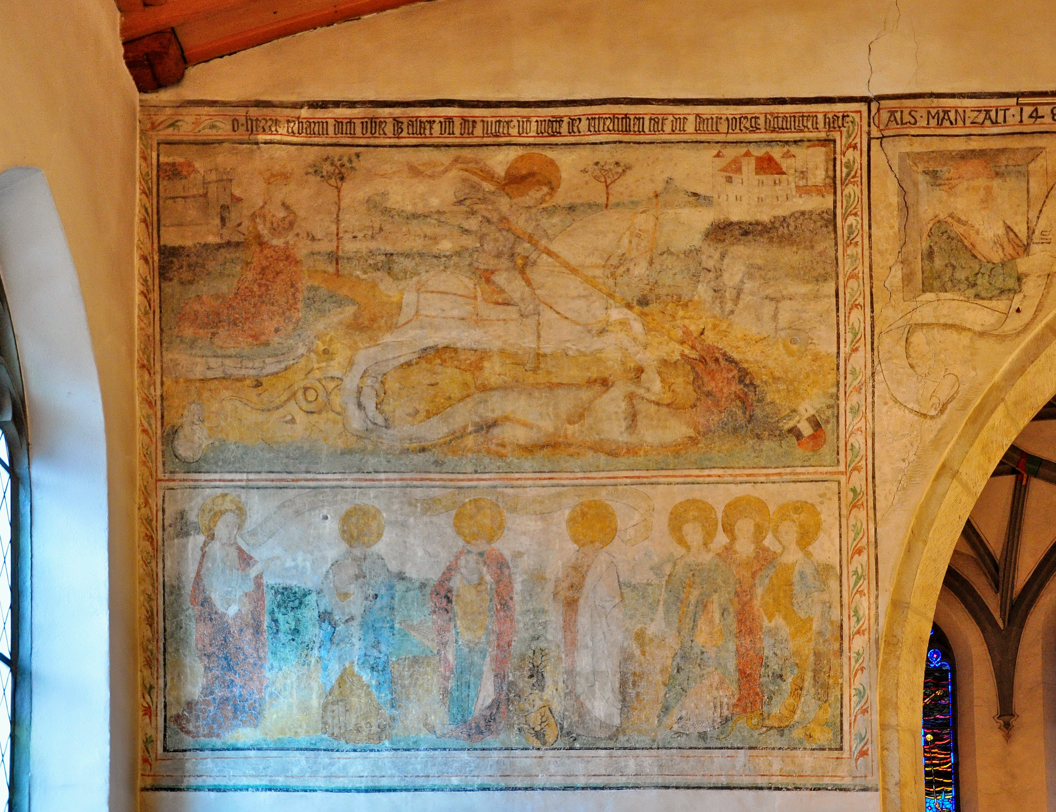 Reformierte Kirche in Pfäffikon (Switzerland) : St. Michael, St. Felix & Regula & Exuperantius